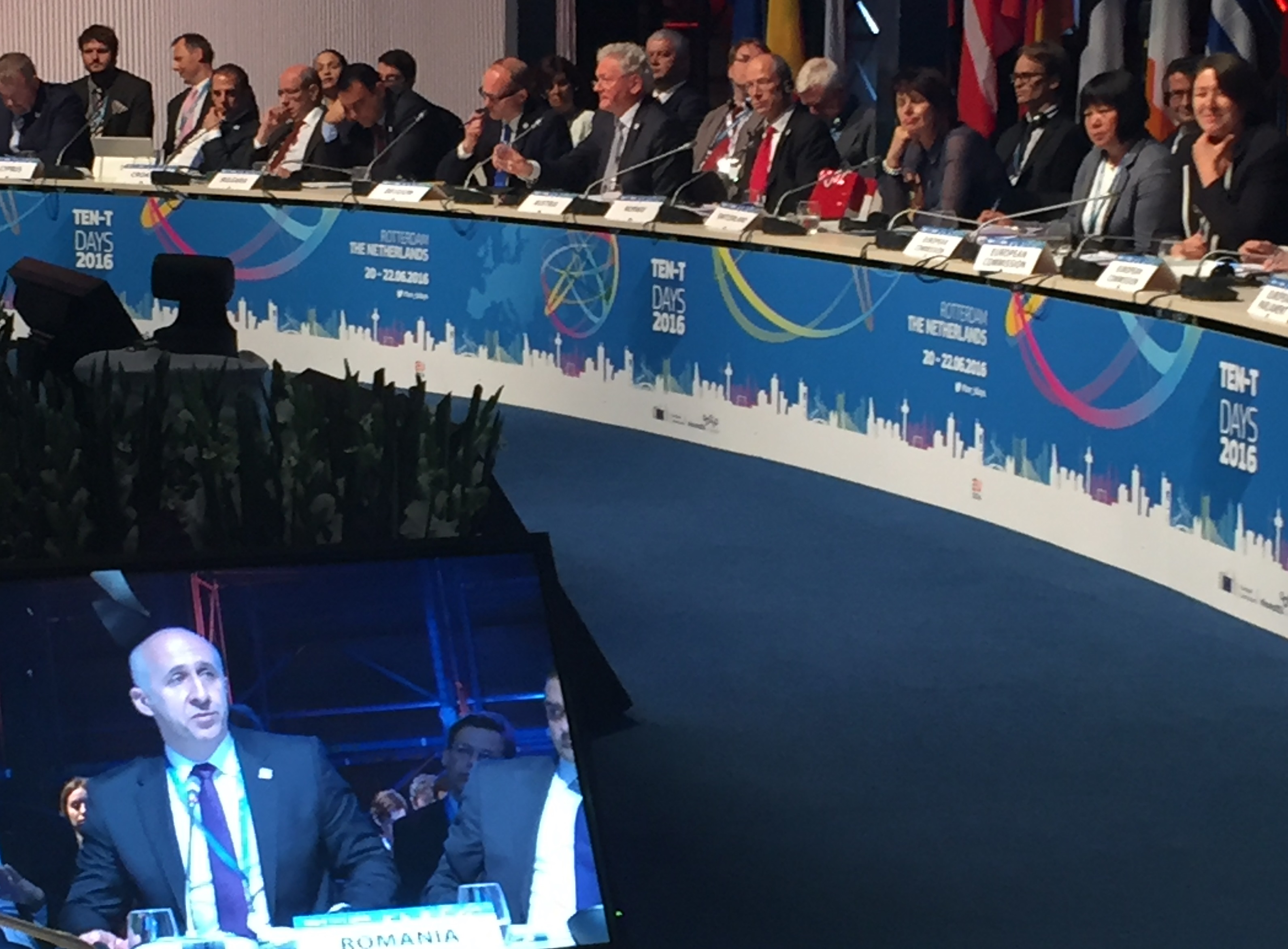 Speech-ul lui Dan M. Costescu la summitul extins al miniștrilor, Europa, Africa, Asia